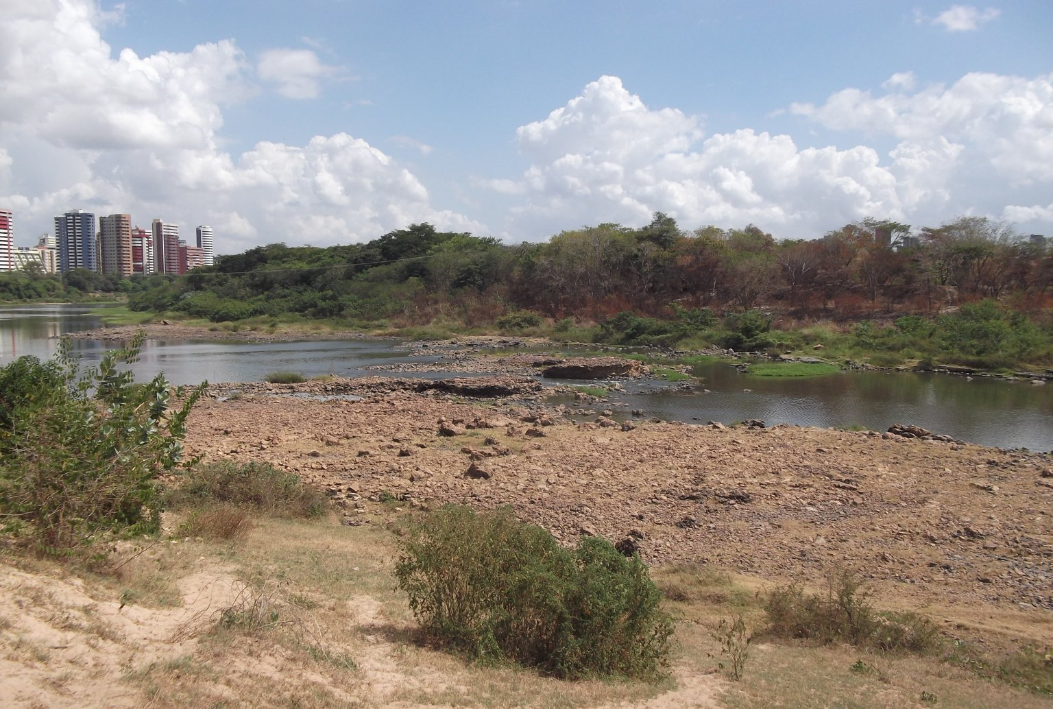 Vista panorâmica da Floresta Fóssil no Rio Poti, em Teresina.